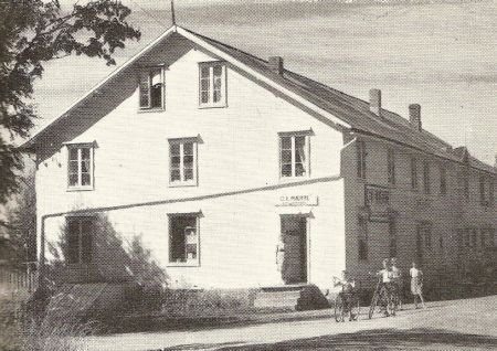 O.K. Mæhres forretning på Hjørnet (matvarer, café) i daværende Skatval kommune.